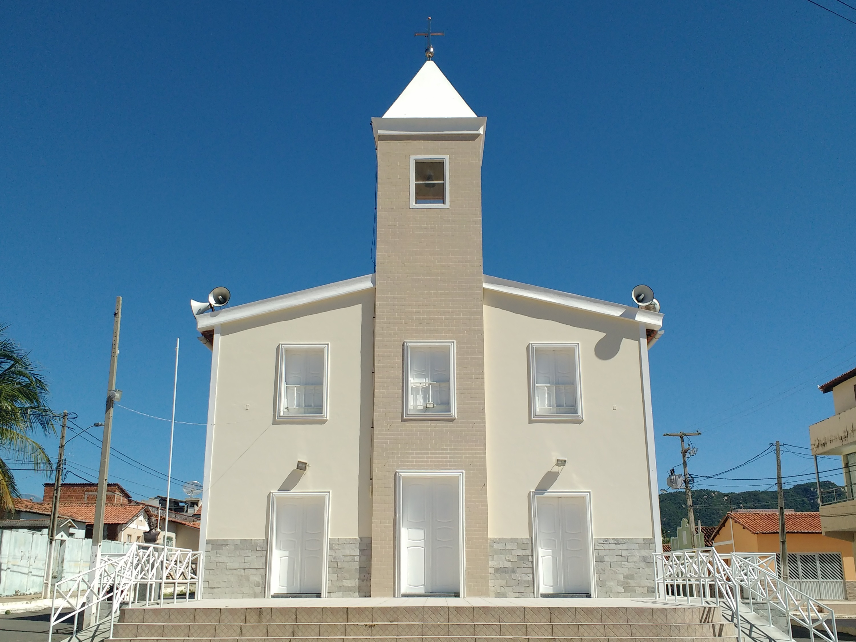 Capela de Santa Luzia, padroeira de Doutor Severiano, Rio Grande do Norte (Brasil), da paróquia do Encanto.